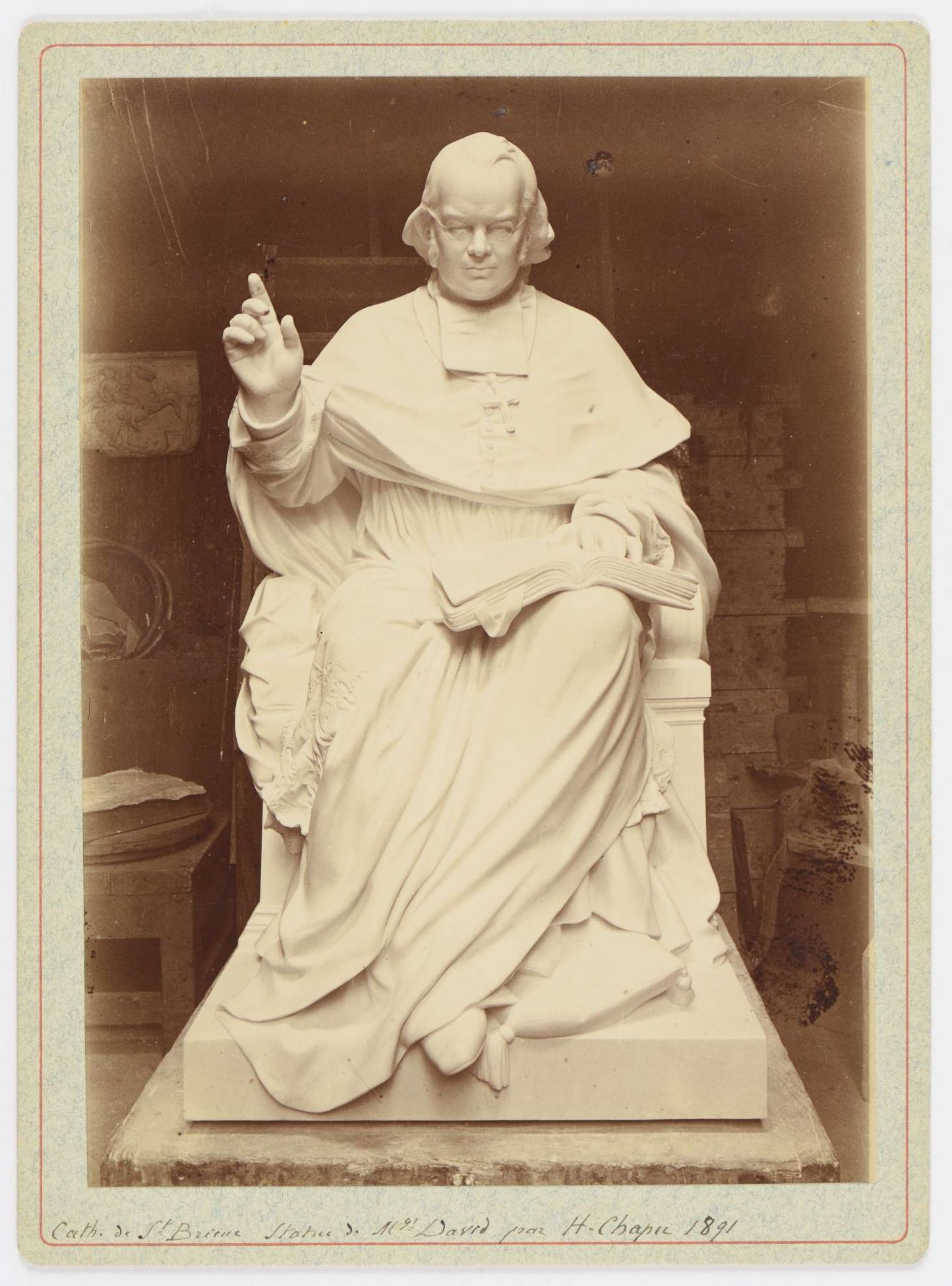 Monument à la mémoire de m[onsei]g[neu]r David, évêque de Saint-Brieuc : statue de l'évêque assis et bénissant (vue rapprochée de face). Mention manuscrite à l’encre noire au recto : Cath. St-Brieuc. Statue de Mgr David par H. Chapu. 1891. Échelle : 1 cm / 1 m. Photographie issue des dossiers de travaux de restauration des cathédrales (1802-1912, conservés aux Archives nationales, (inventaire et documents numérisés consultables en ligne).